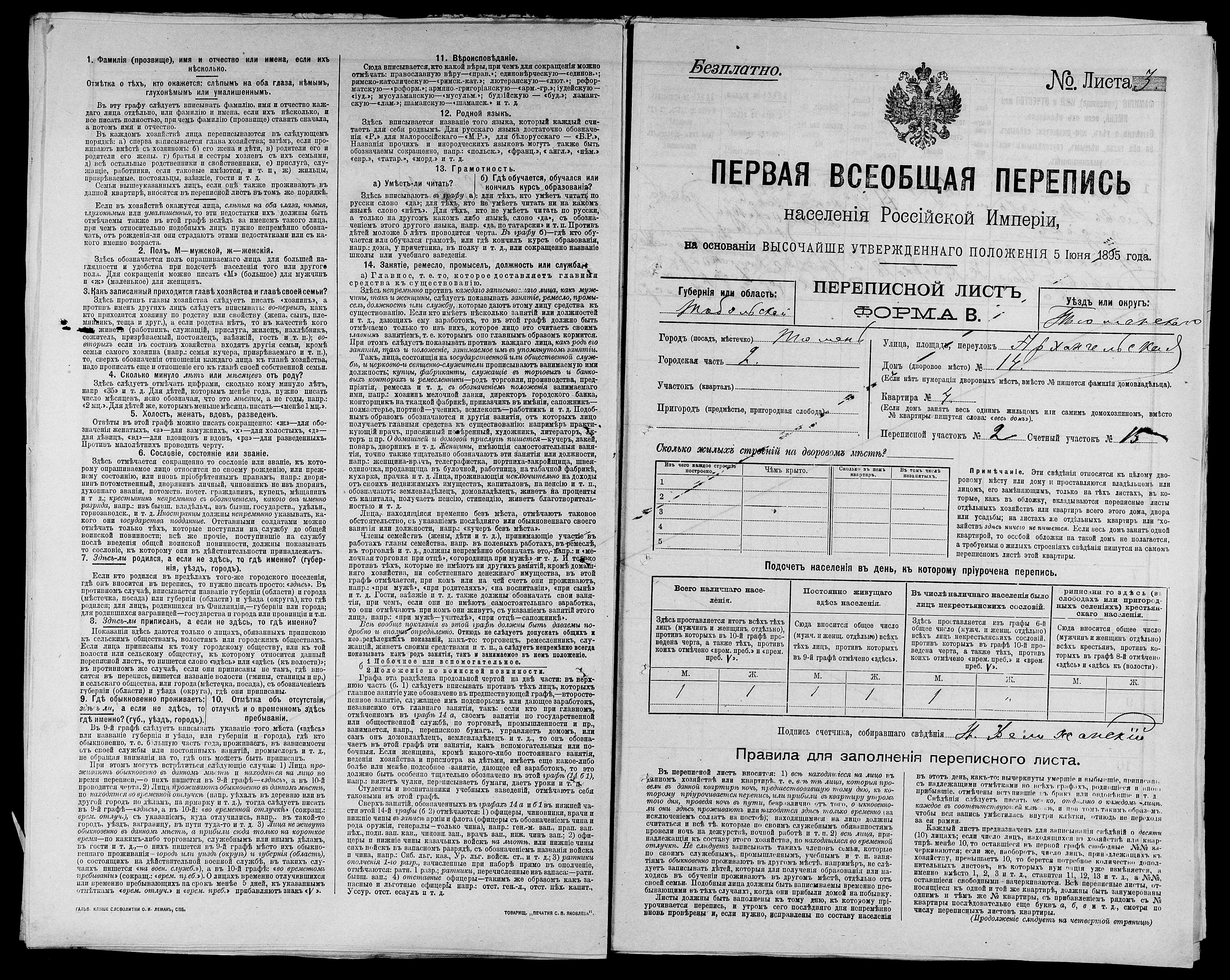 Перепись 1897, Тобольская губерния, г. Тюмень, ул. Архангельская, д. 14, кв. 4